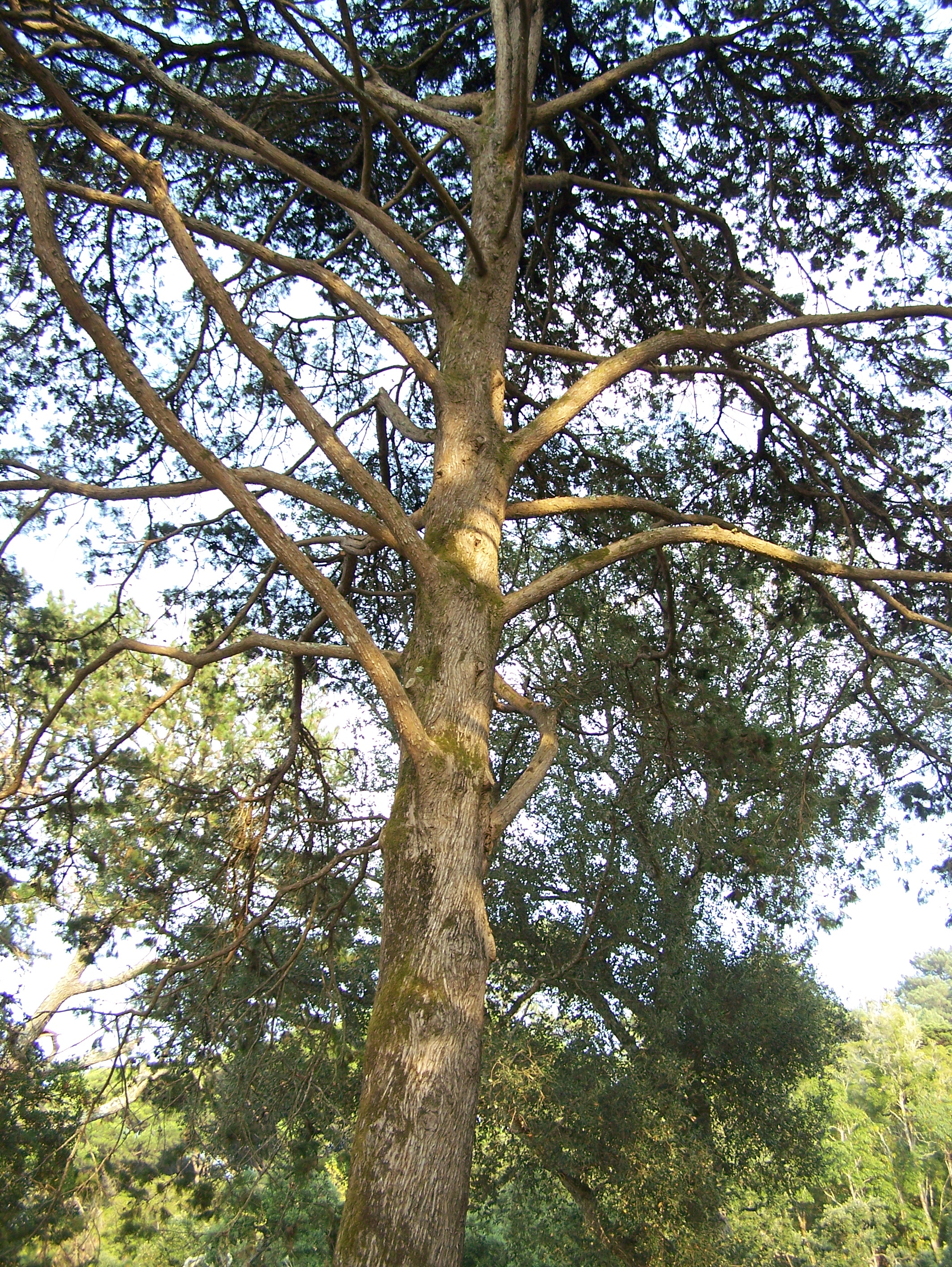 Palácio de Monserrate, Cipreste do Buçaco. Na inscrição perto da árvore lê-se: Cupressus Lusitanica/CUPRESSACEAE/Cipreste do Buçaco/Os trabalhos de manutenção desta árvore foram patrocinados por/WILLIAM COOK/Outubro de 1999. Sintra, Portugal.